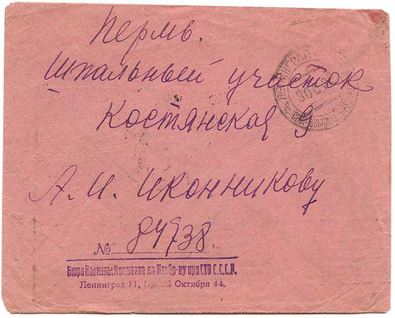 Пример почтовых отправлений СССР со штемпелем паушальной оплаты «Сбор взыскан по расчёту. Ленинград». Служебный конверт, отправленный из Бюро новизны Комитета по изобретательству при СТО СССР (Ленинград) в Пермь (1930-е).